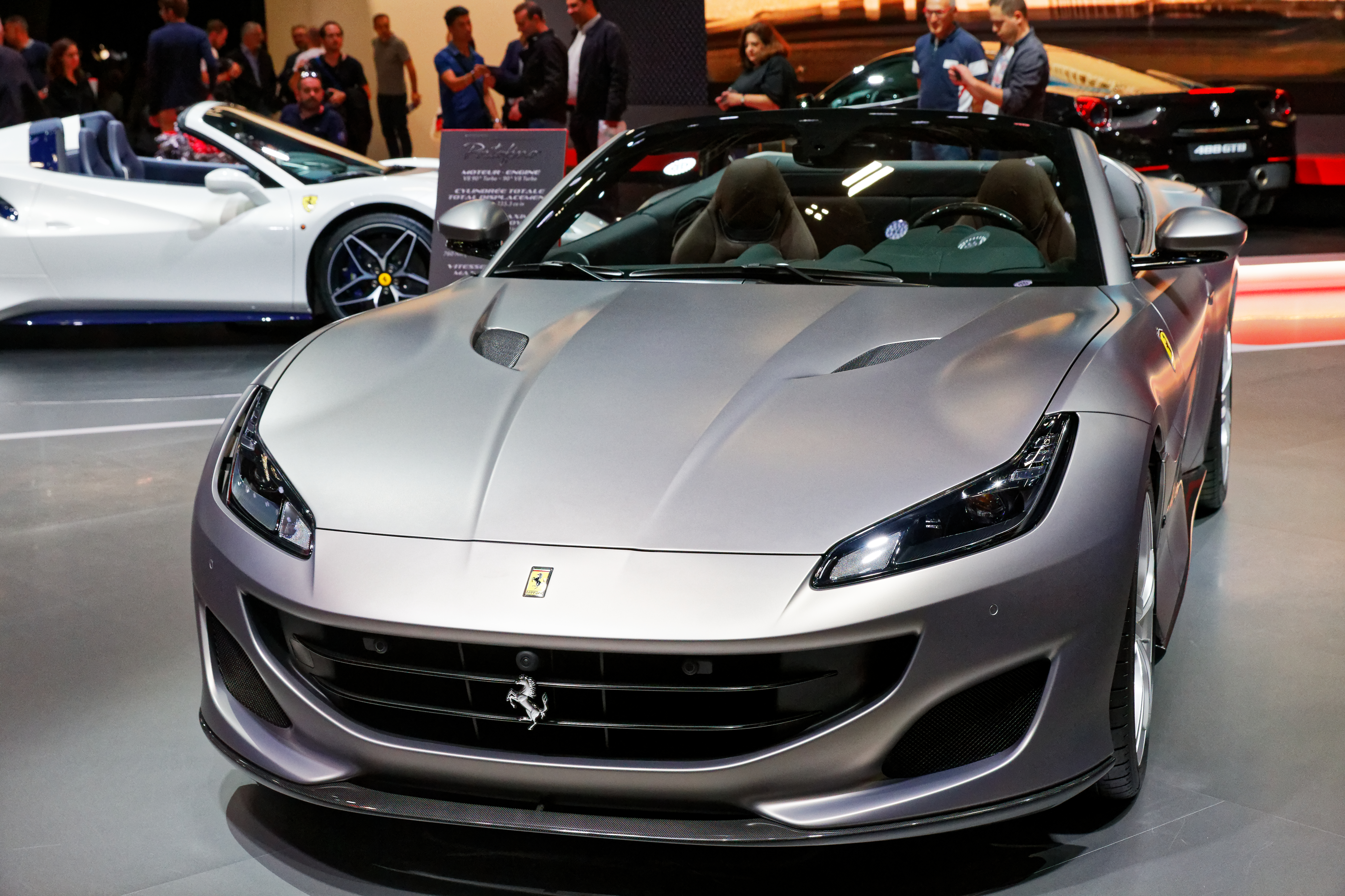 Une Ferrari Portofino exposée lors du mondial de l'automobile de Paris 2018.